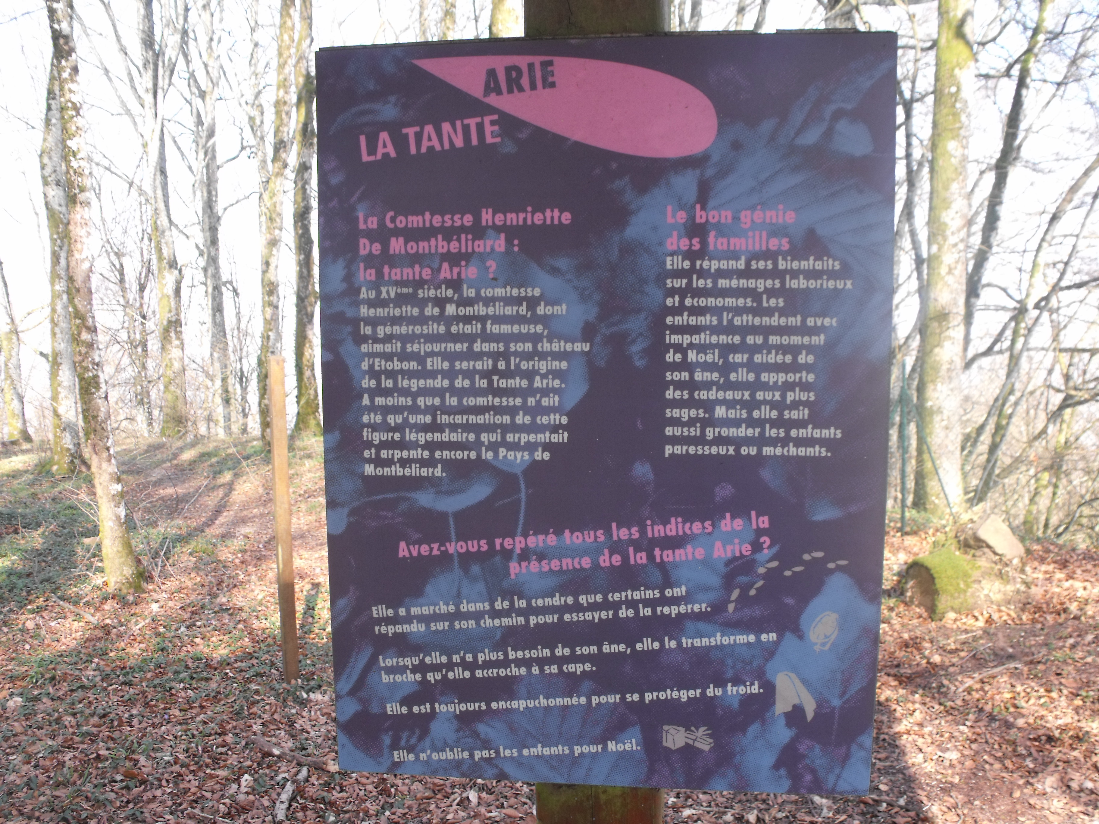 Panneau d'information sur le site de l'ancien château d'Etobon, Haute-Saône, France